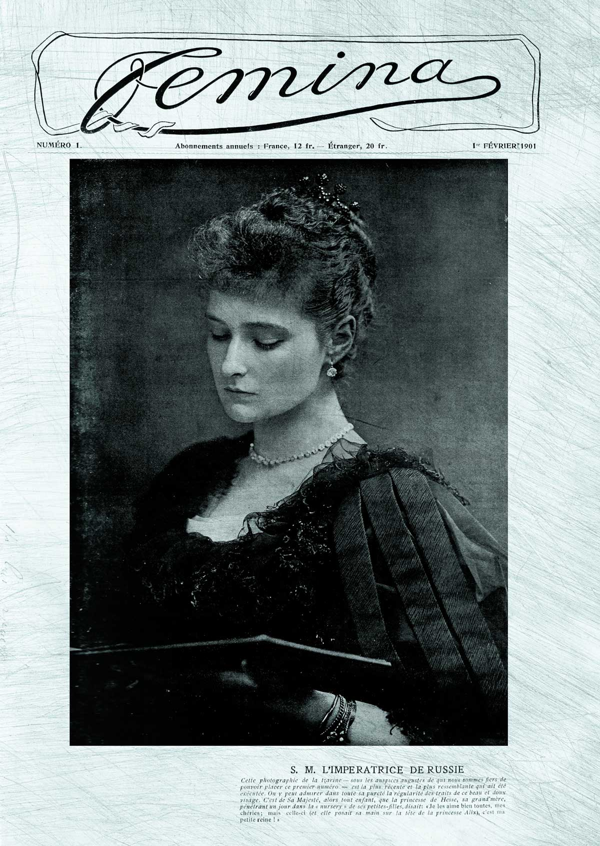 Couverture du premier numéro de Femina daté 1er janvier 1901, magazine français édité à Paris par Pierre Lafitte.